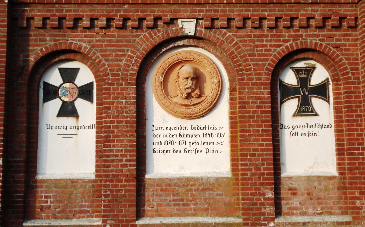 Relief am Parnassturm